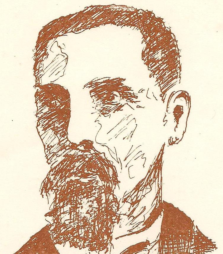 Litografia de José Borges de Macedo